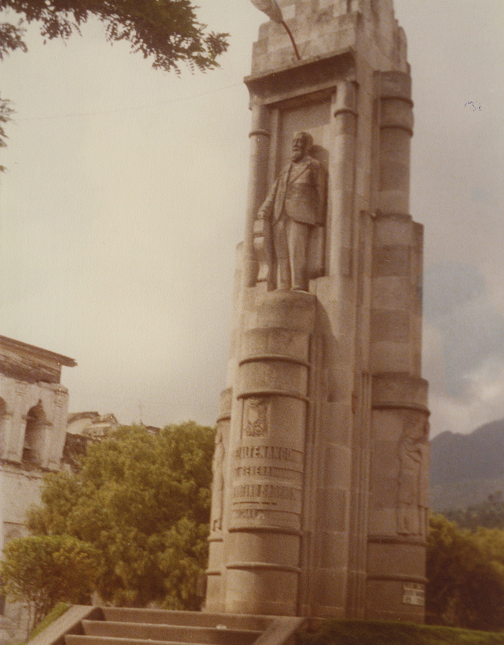 Quetzaltenango, Guatemala, 1979. Monument to Justo Rufino Barrios.